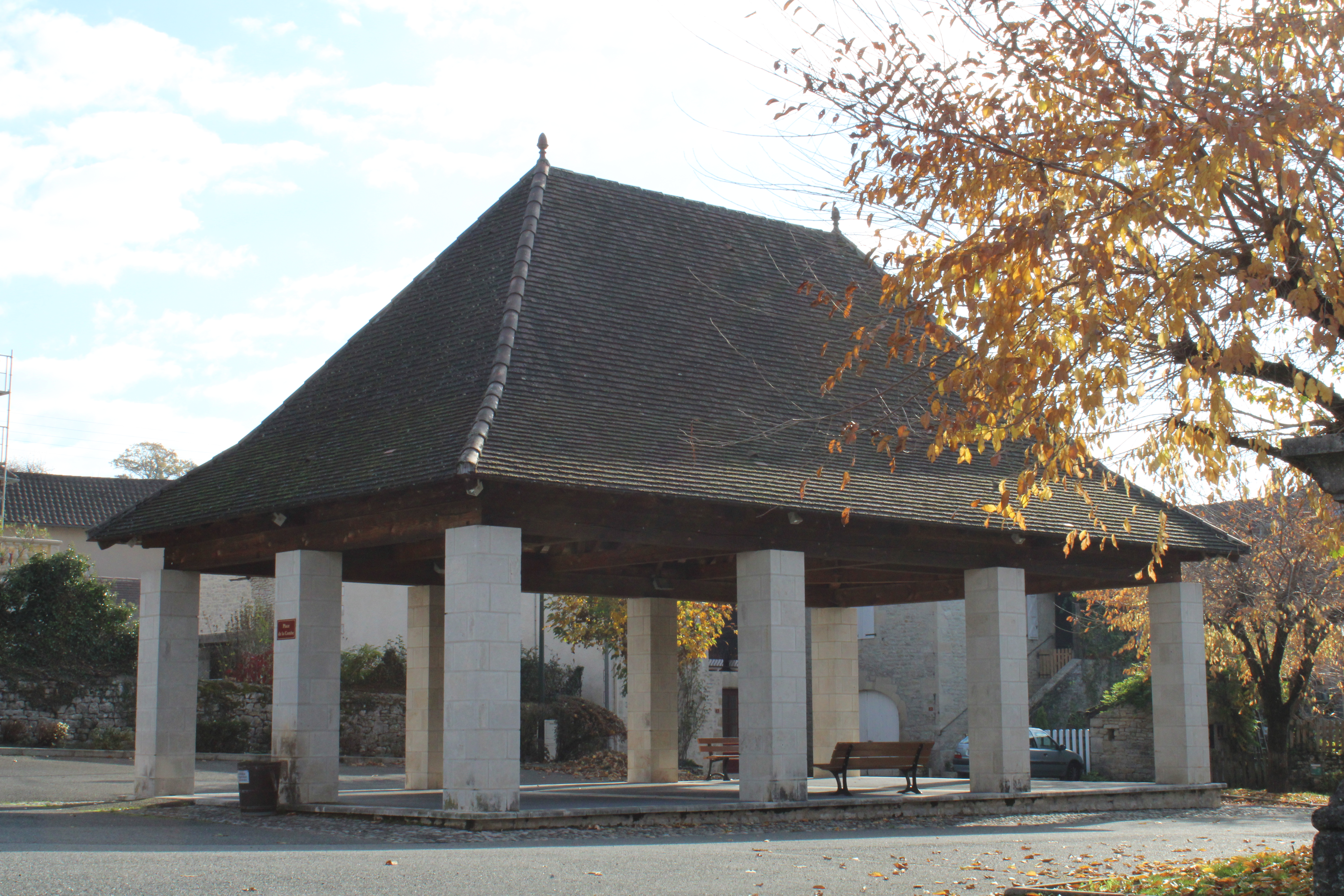 Halle du village de Glanes, automne 2018.